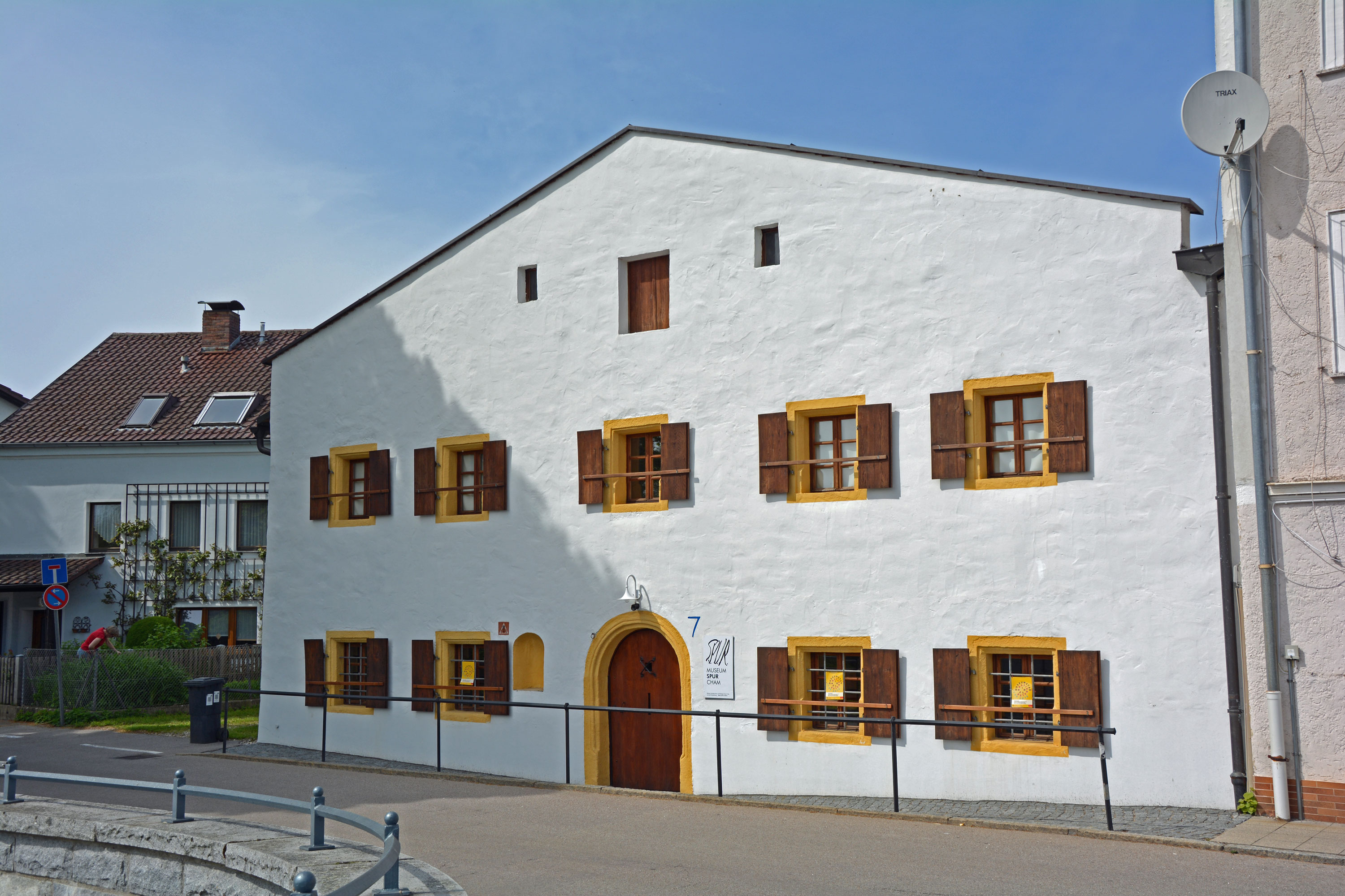 Außenansicht des Museums S.P.U.R. in Cham.